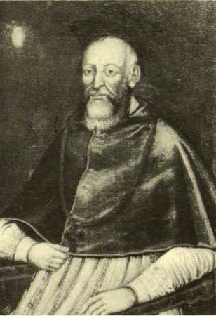 Беларуская (тарашкевіца): Партрэт Андрэя Гасковіча (Andrej Haskovič) або Юрыя Белазора (Jury Biełazor) (?)